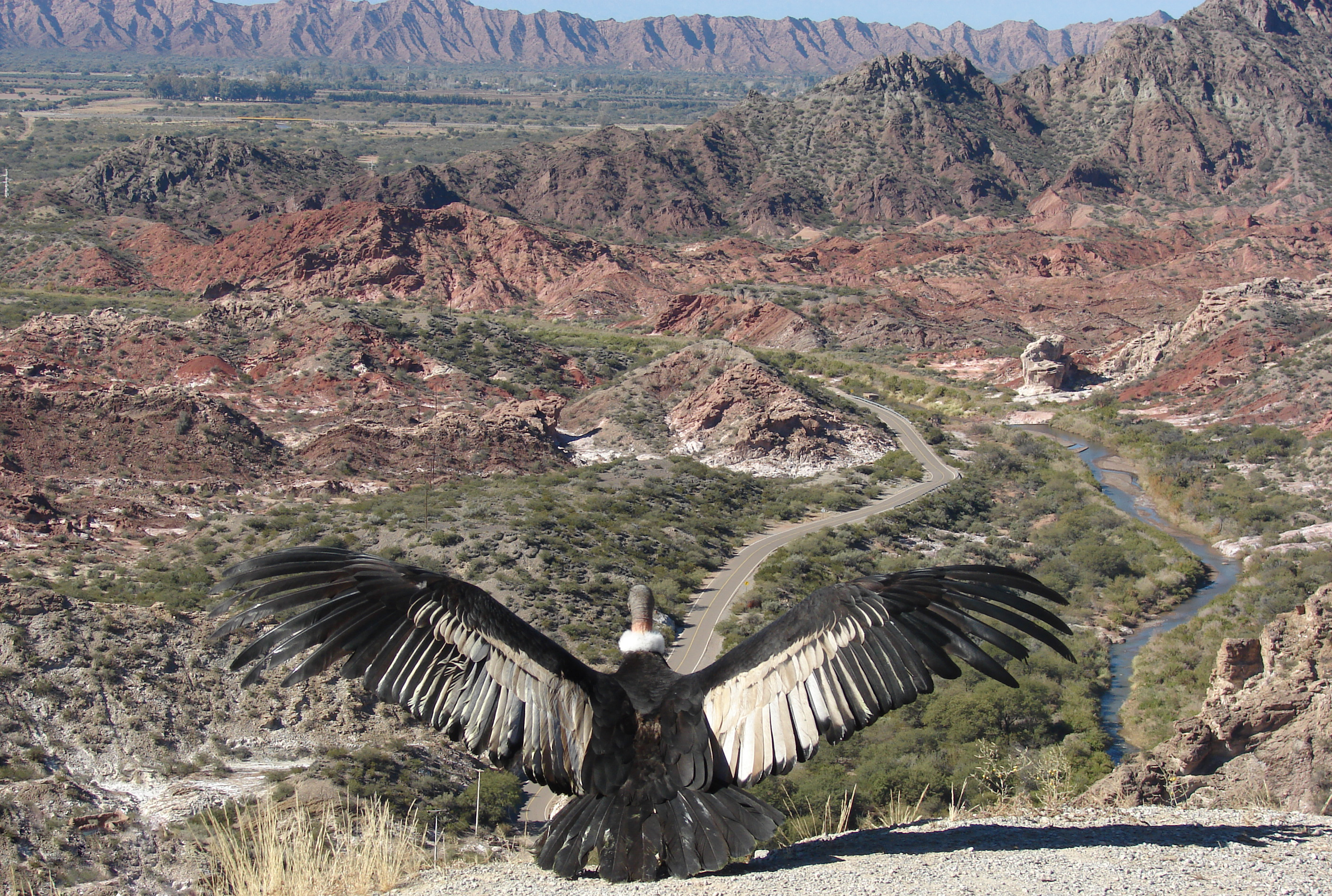 Hembra adulta de Cóndor Andino a punto de emprender vuelo en el Área Natural Protegida La Ciénaga, San Juan, Argentina.